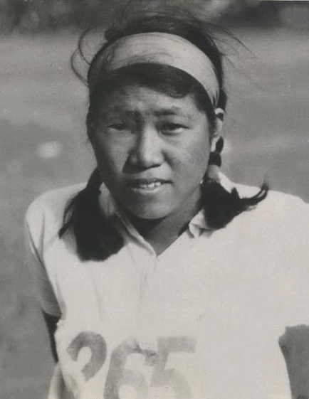 Michiko Nakanishi Press Photo